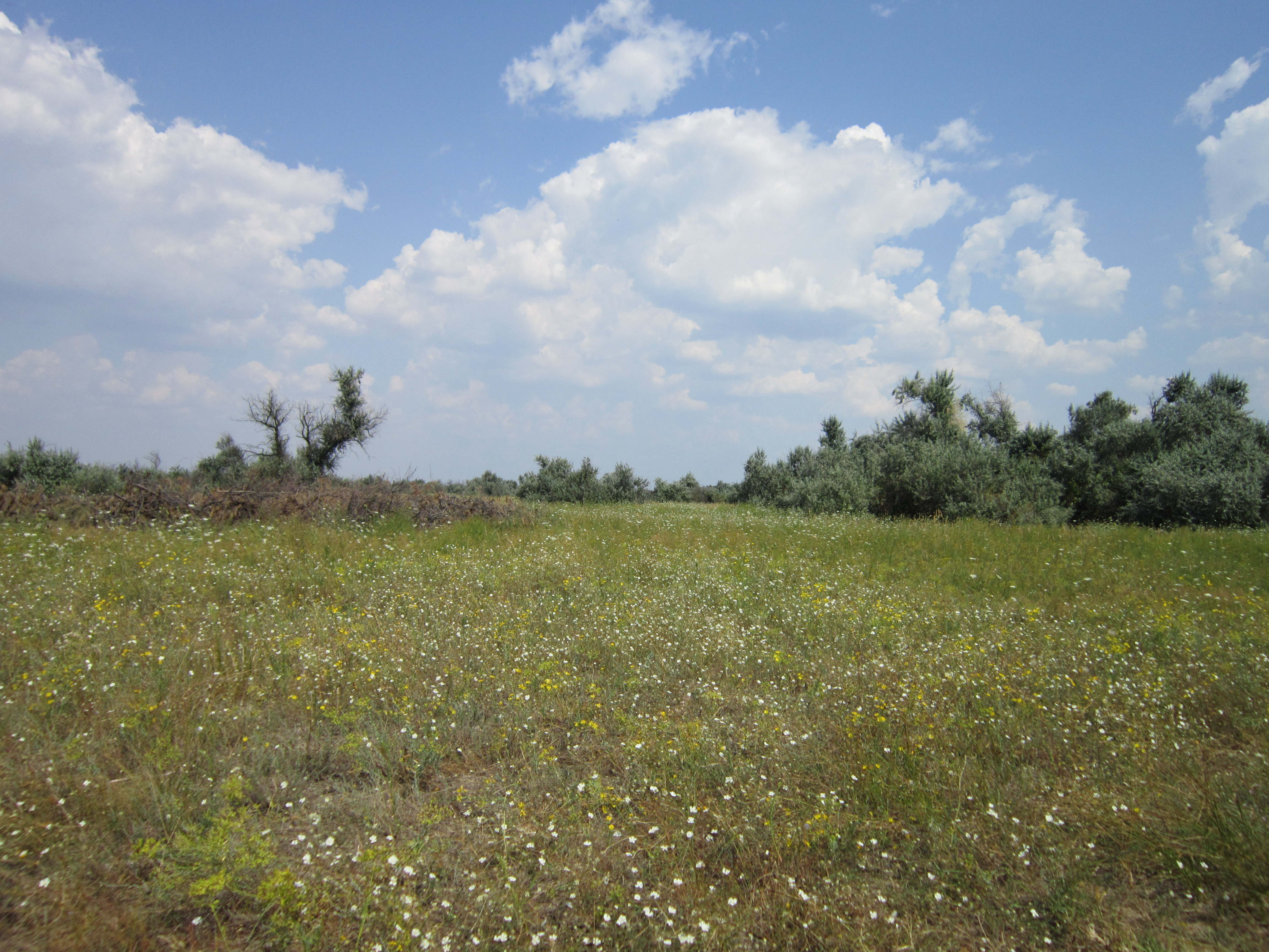 «Кінбурнська коса», Очаківський р-н